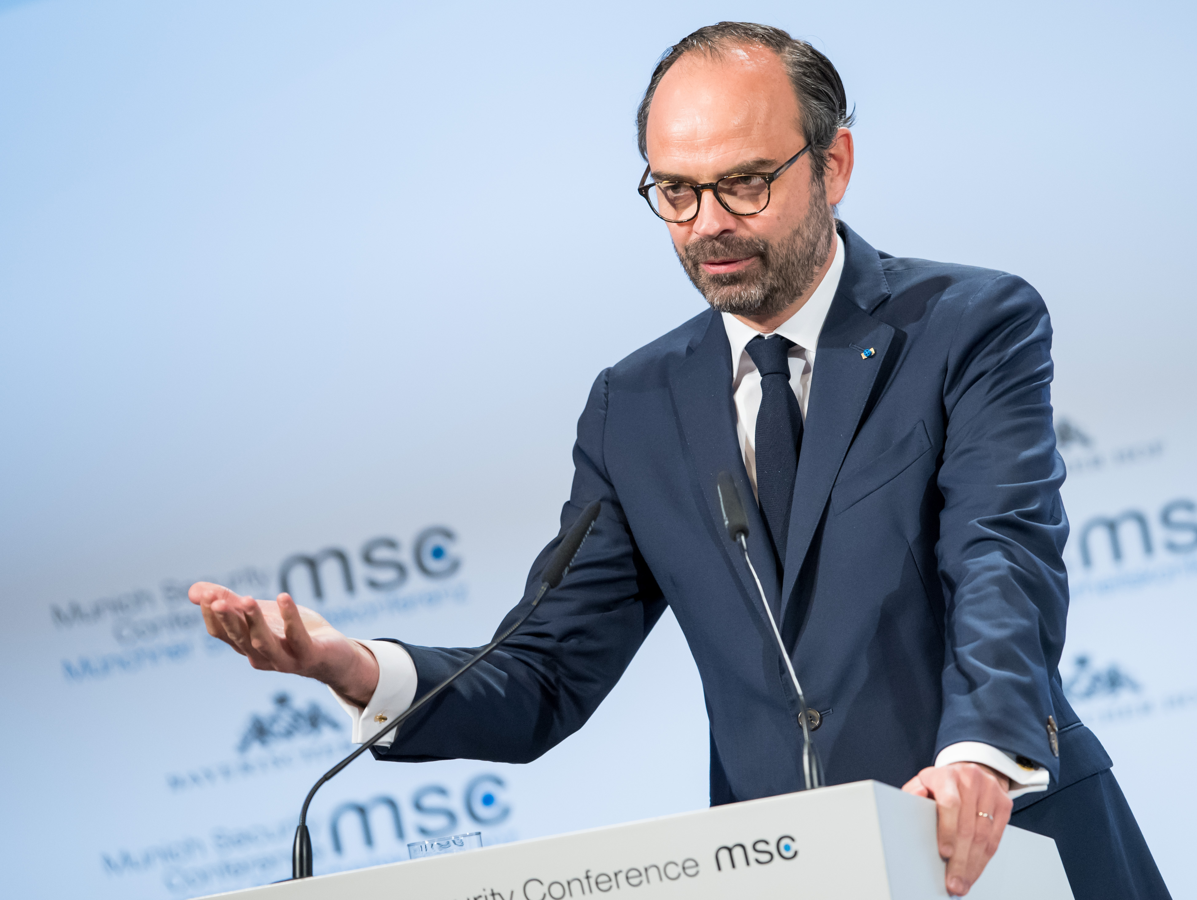 Edouard Philippe während der Münchener Sicherheitskonferenz 2018